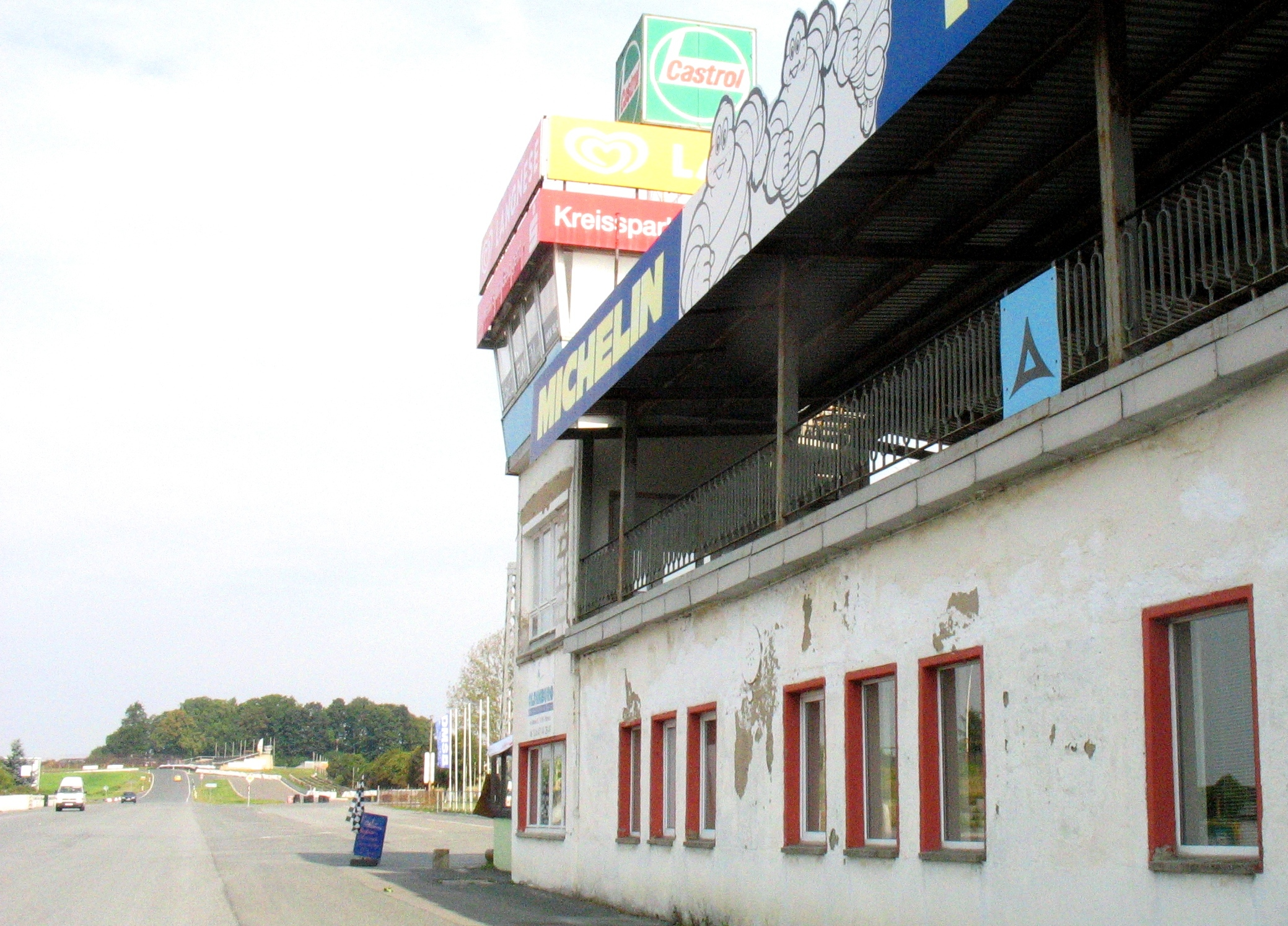 Start- und Zielgebäude alt Schleizer Dreieck